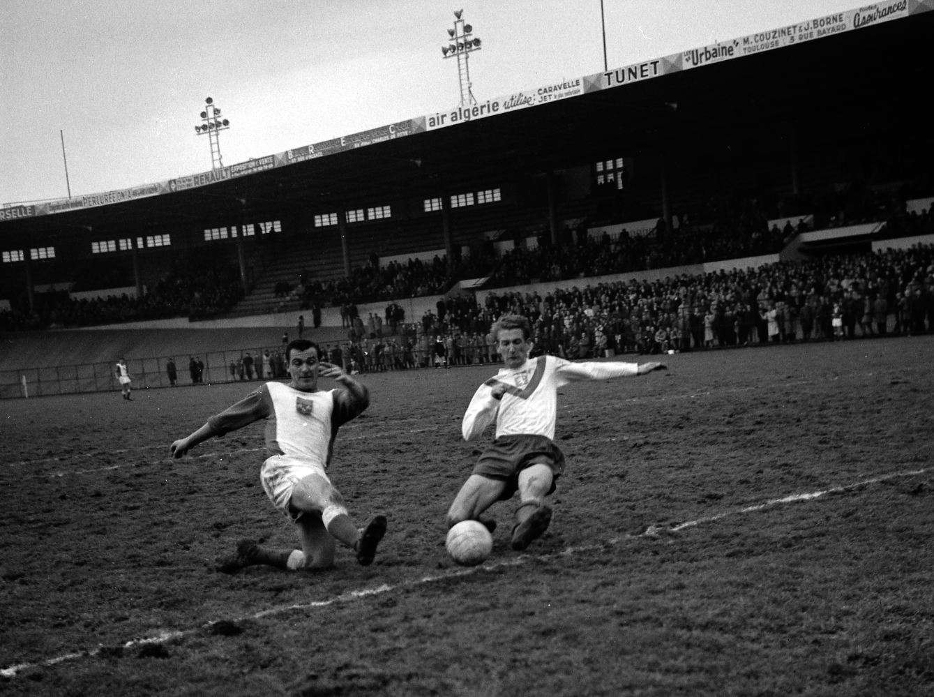 Stadium municipal de Toulouse, 1bis allées Gabriel-Biénès. 24 décembre 1961. L'équipe du Toulouse Football Club rencontre l'équipe de Lyon. Cliché pris durant le match ; au 1er plan action de jeu ; en arrière-plan gradins avec spectateurs.